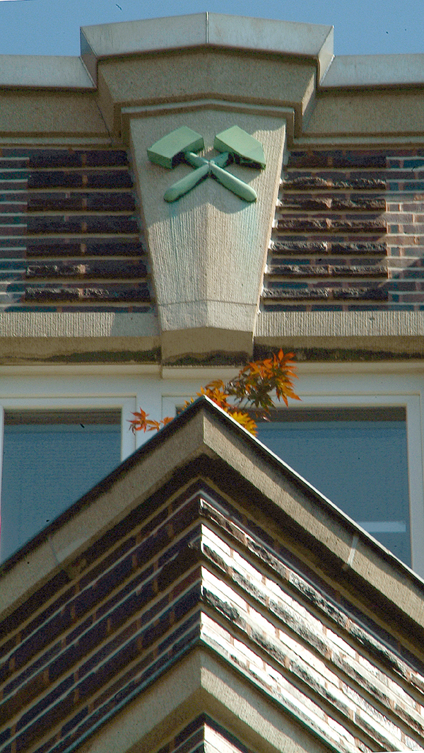 Monumentaler Abschluß mit gekreutzten Bergwerks-Hämmern über dem dreieckigen Mittelerker vom Hochhaus Glückauf in der Südstadt von Hannover ...